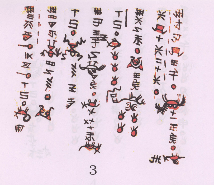 六甲反书 第三页 水族文字（水书）样品